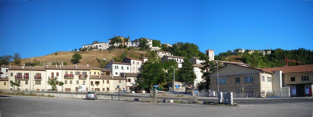 Colfiorito, Foligno, Perugia, Umbria, Italy